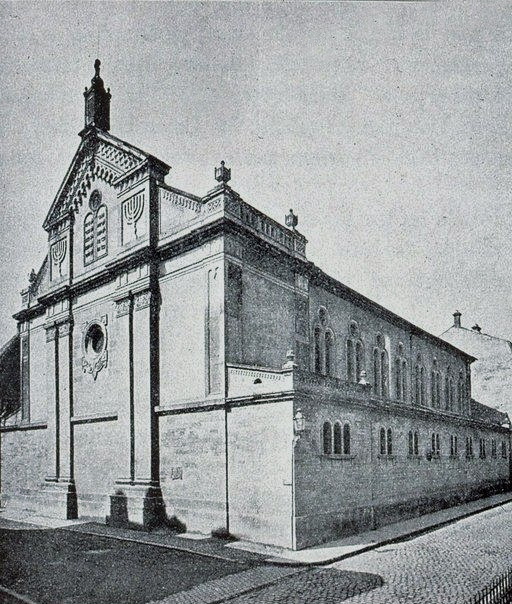 Mulhouse. Synagogue, inaugurée en 1849. Bibliothèque nationale et universitaire de Strasbourg